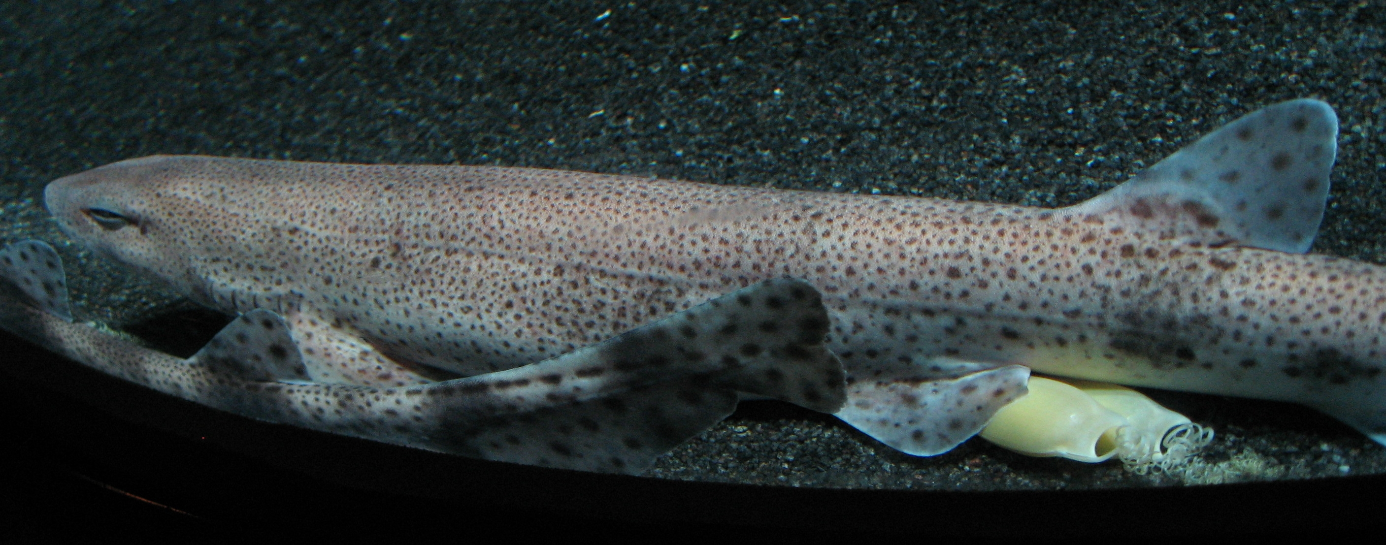 Scyliorhinus canicula in Aquarium Cinéaqua Map: 48° 51' 44" N 2° 17' 27" E